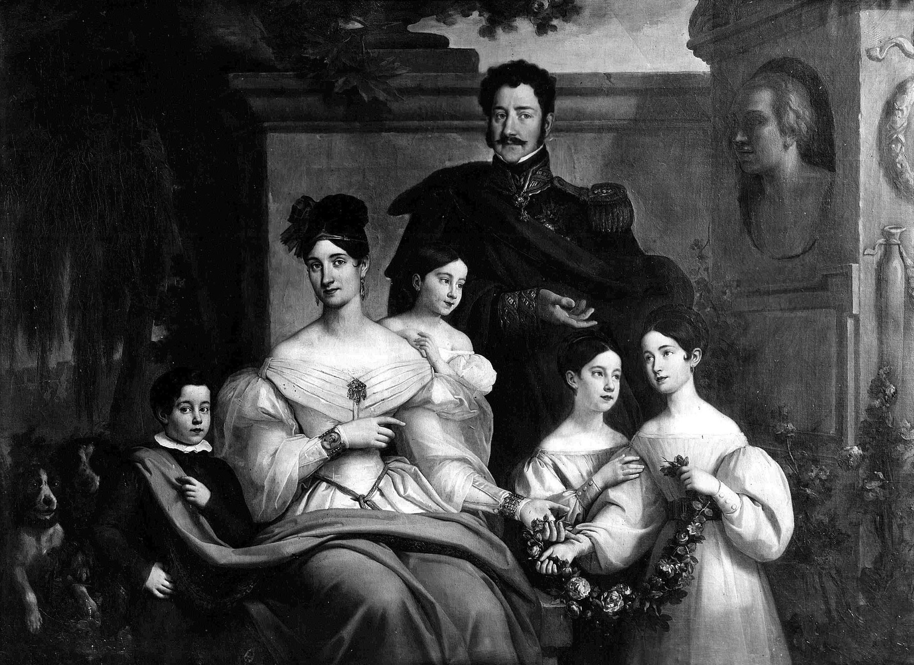 il tenente generale Carlo Filangieri, principe di Satriano, sua moglie Agata Moncada di Ventimiglia (1803-1862) ed i quattro loro figli: Carolina, poi duchessa di Bovino (1821-1895) Giovanna, poi duchessa Serra di Cardinale (1822-1886) Gaetano, 7° principe di Satriano e 2° duca di Taormina (1824-1892) Teresa, poi duchessa di Roccapiemonte (1826-1903)